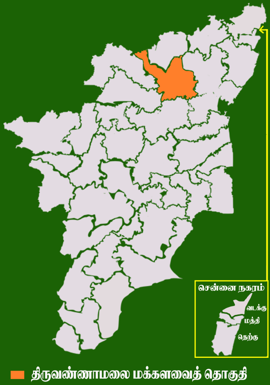 தமிழக வரைபடத்தில் உள்ள திருவண்ணாமலை மக்களவைத் தொகுதி